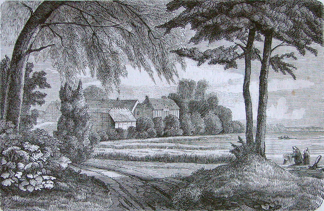 Farumgaard, Seeland, Denmark